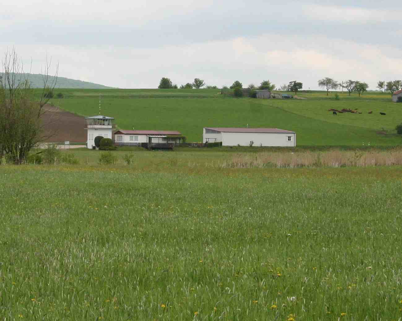 Flugplatz Bubenheim